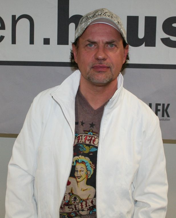 Uwe Ochsenknecht zu Gast bei der Podiumsdiskussion Open.House in der Mannheimer Popakademie